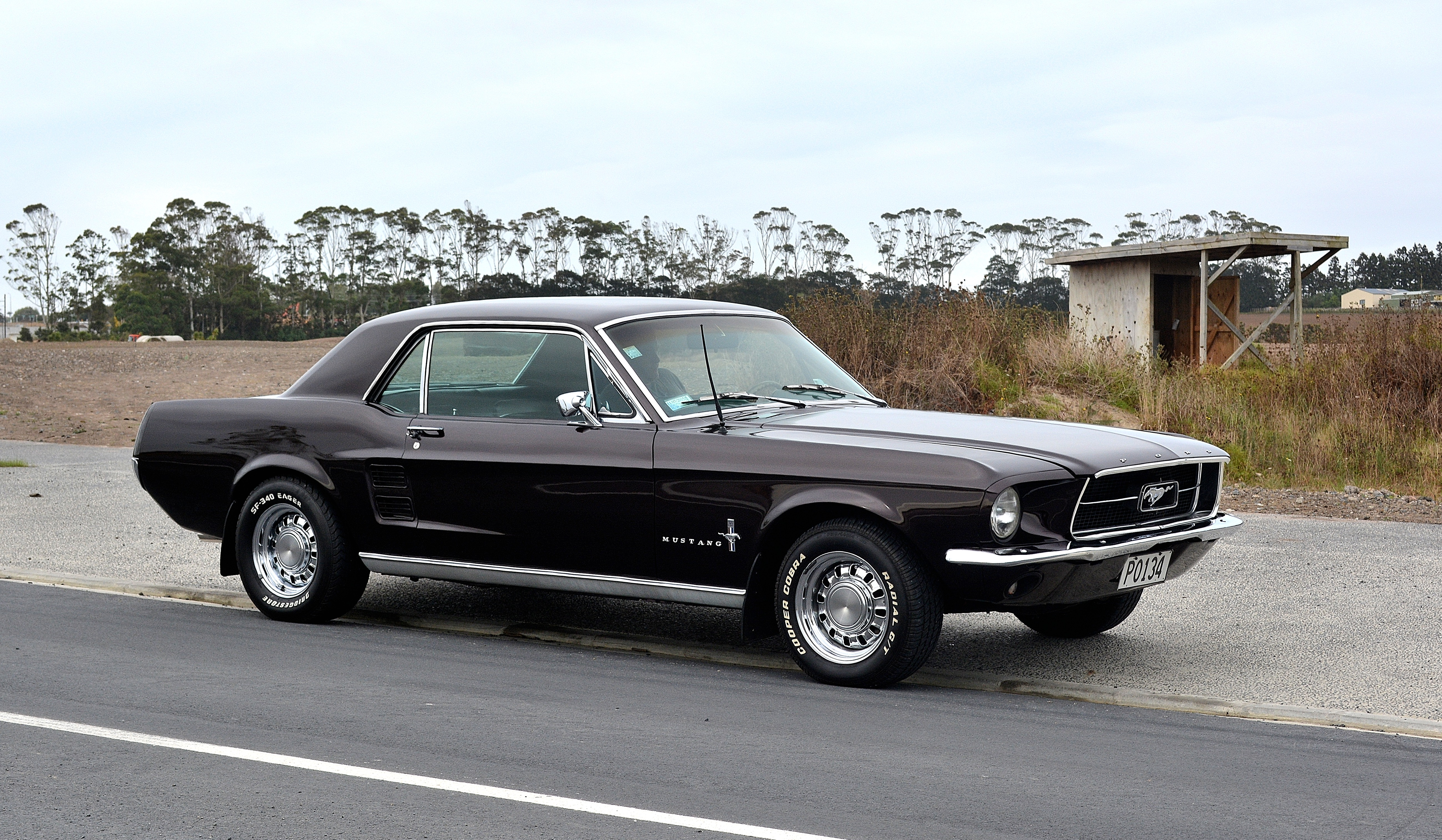 Westgate,West Auckland.New Zealand